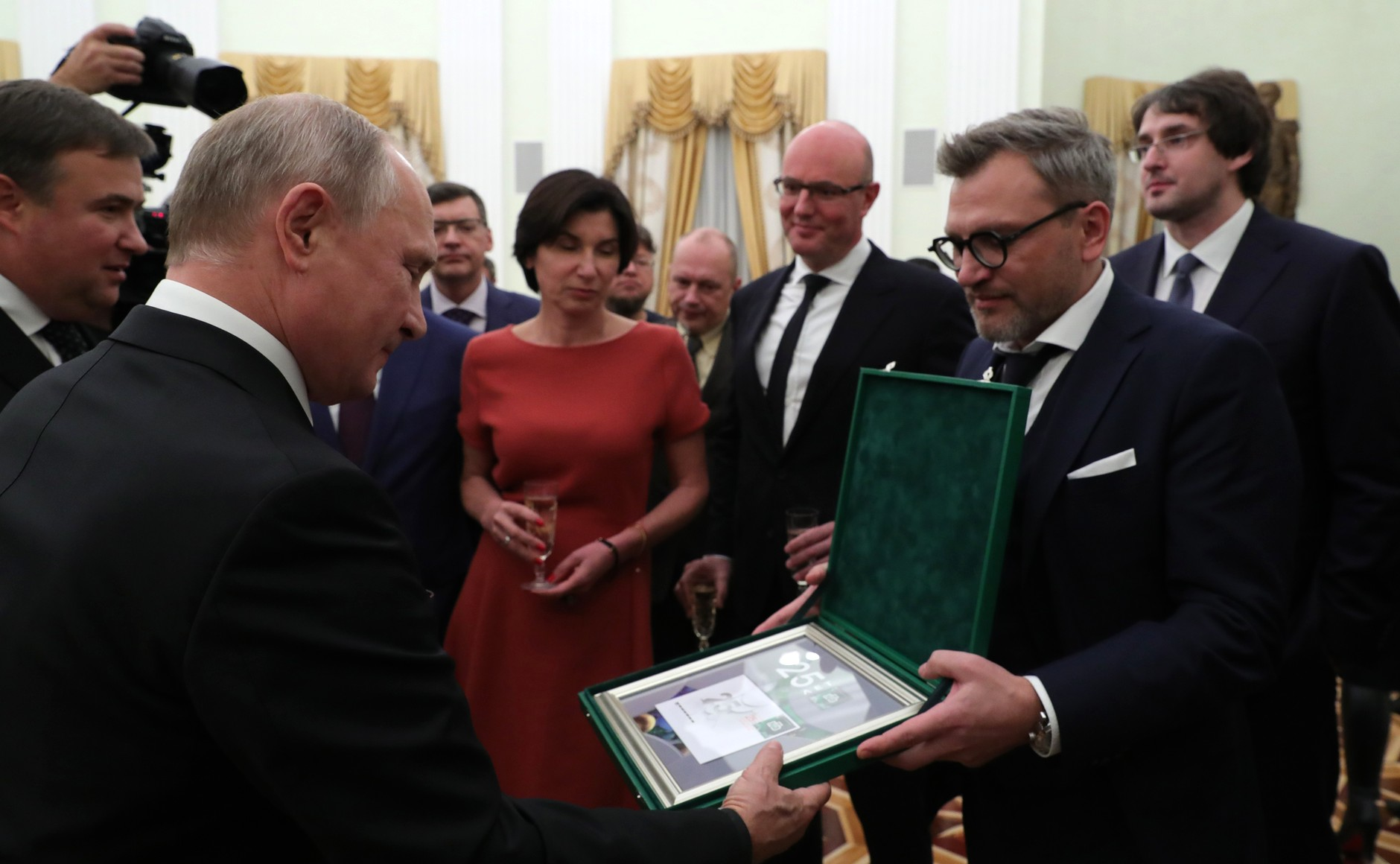 Встреча Президента Российской Федерации Владимира Путина с коллективом телекомпании НТВ.